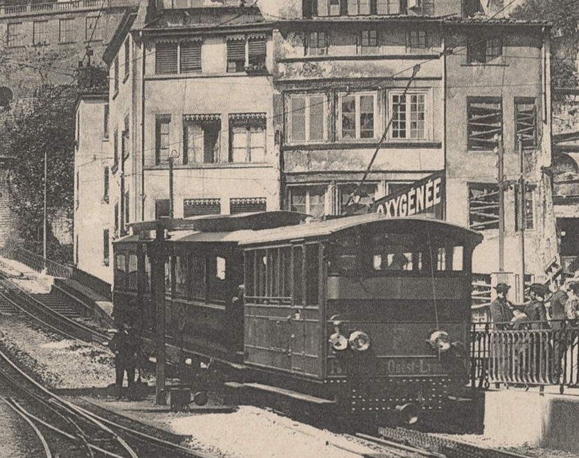 Crémaillère de Lyon (en service jusqu'en 1955)